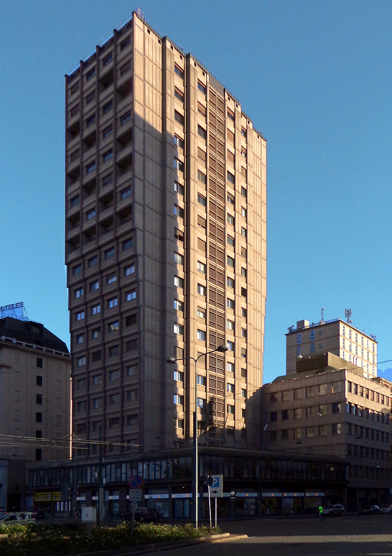 Milano, la Torre Turati in via Turati 40 (angolo piazza della Repubblica). Fu costruita dal 1963 al 1968 su progetto di Giovanni e Lorenzo Muzio.